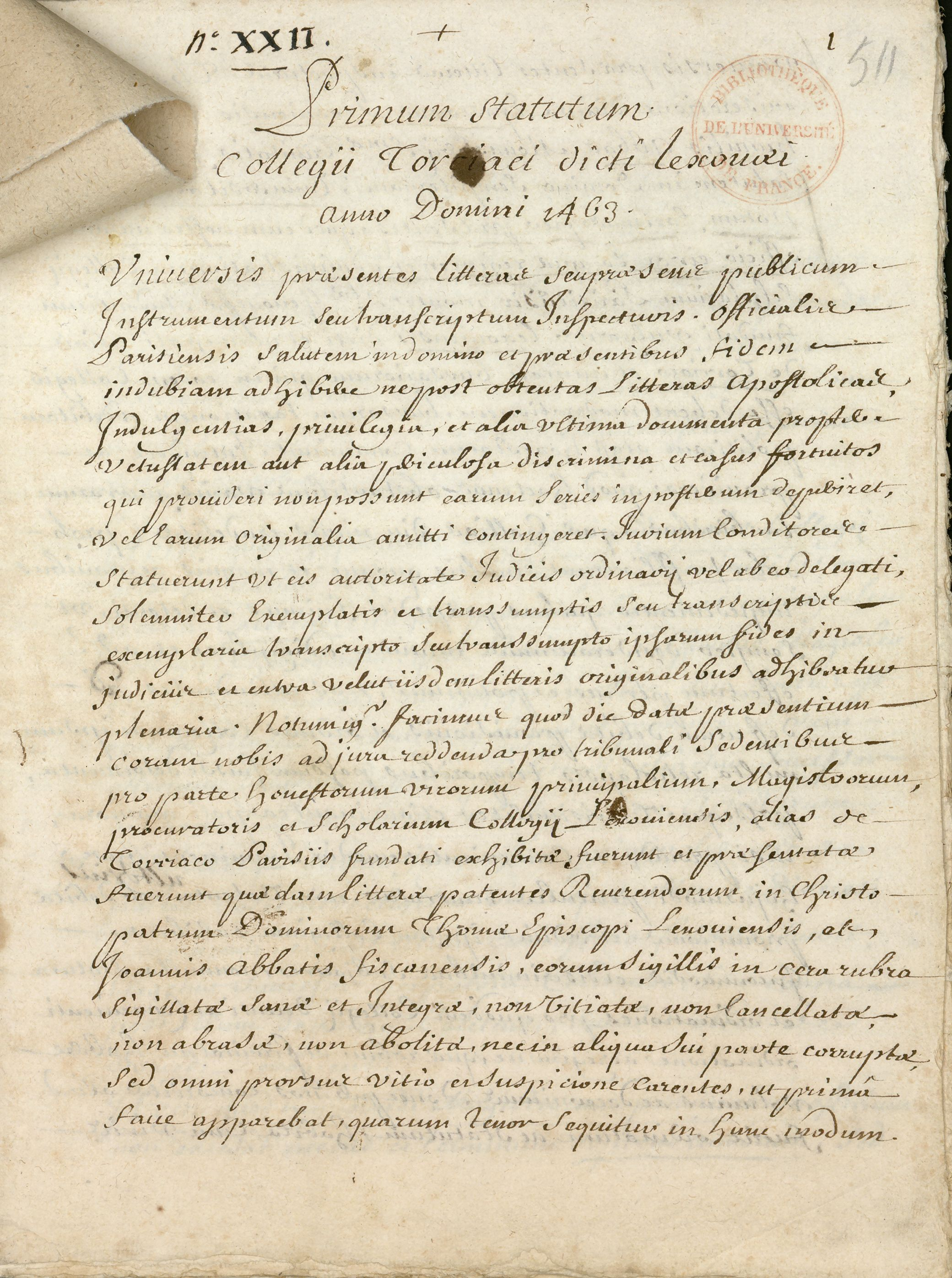 Manuscrit en latin, dans un registre de 738 feuillets consacré aux fondations et statuts des collèges.